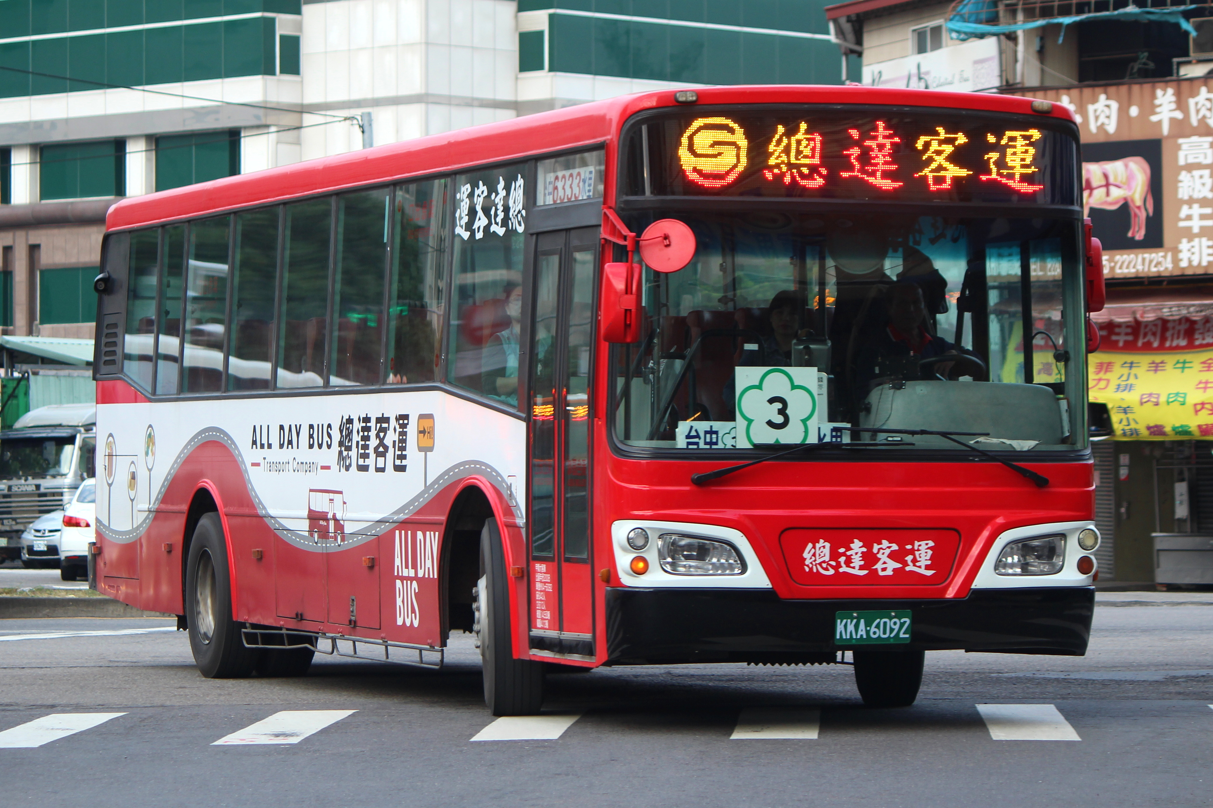 6333 干城